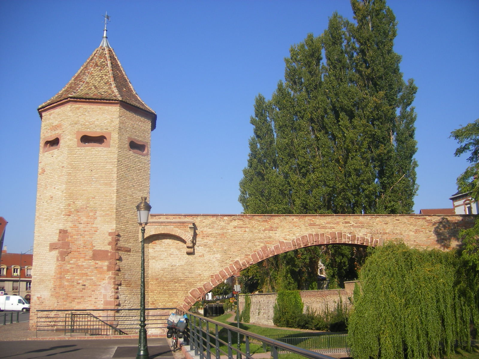 Haguenau